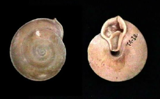 Labyrinthus leucodon del estado Falcón